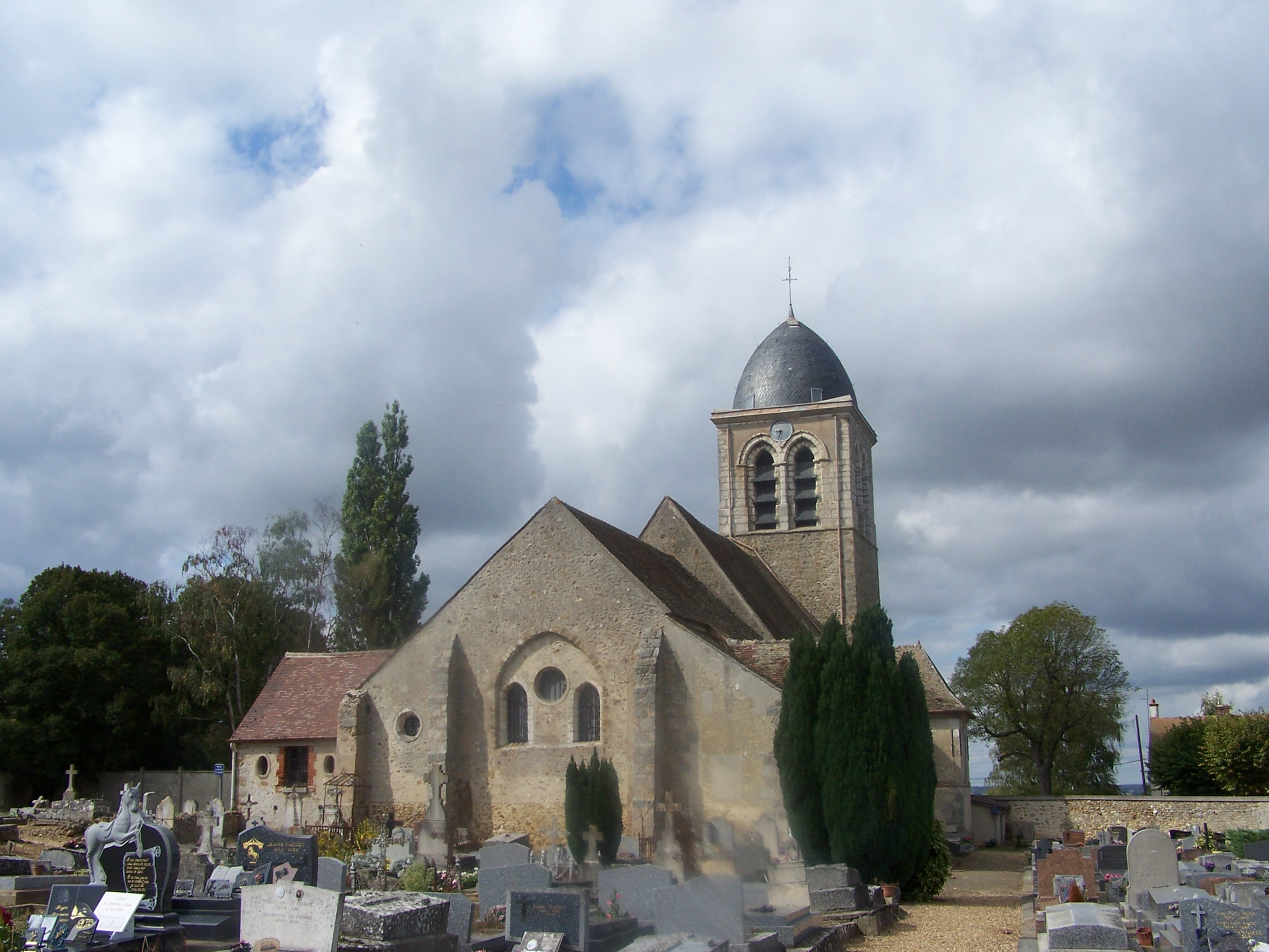 Église de Jouars à Jouars-Pontchartrain (Yvelines, France)